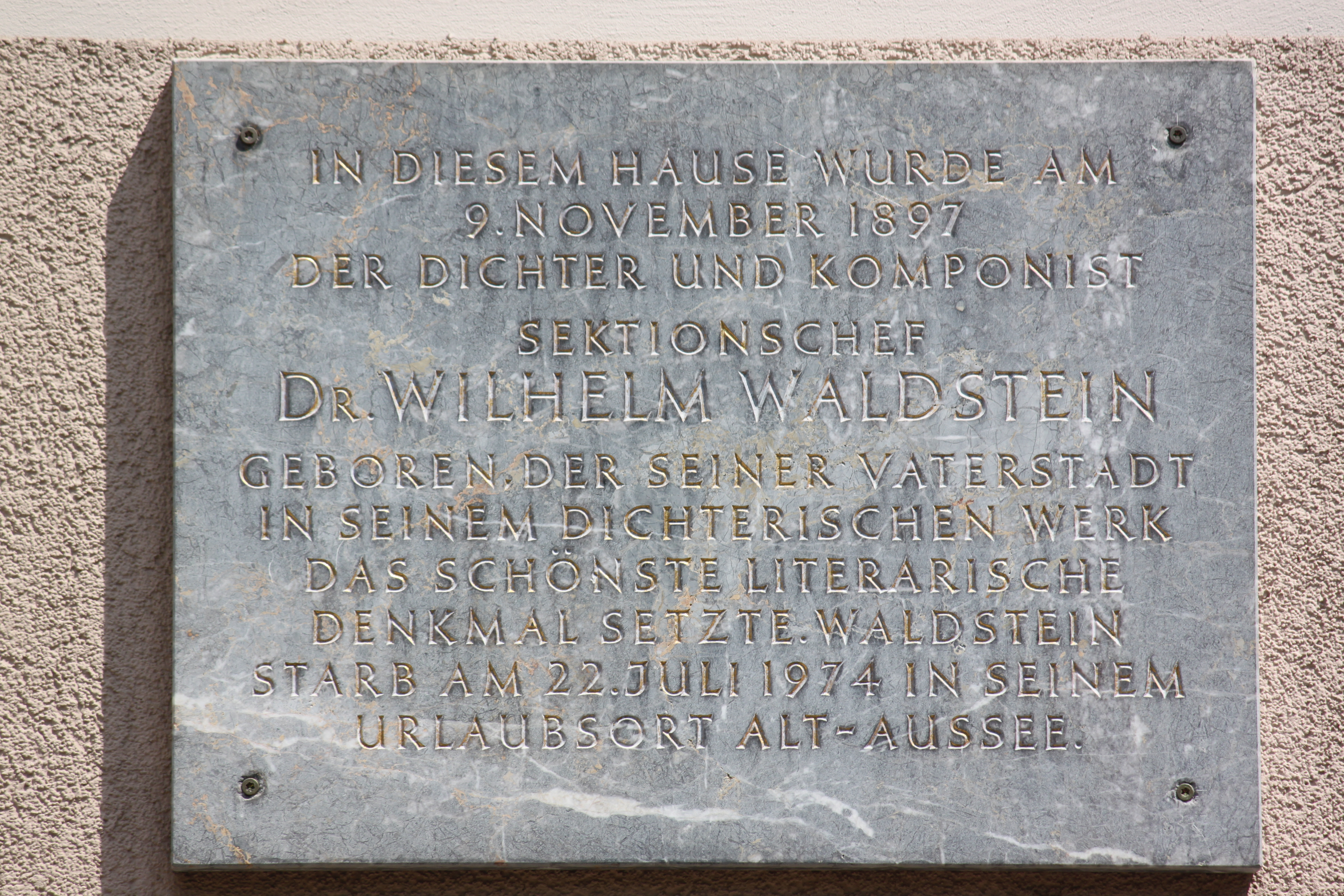 Gedenktafel zu Wilhelm Waldstein (1897-1974) in der Pöckgasse 4 in Wiener Neustadt, Sektionschef Bundesministerium für Unterricht